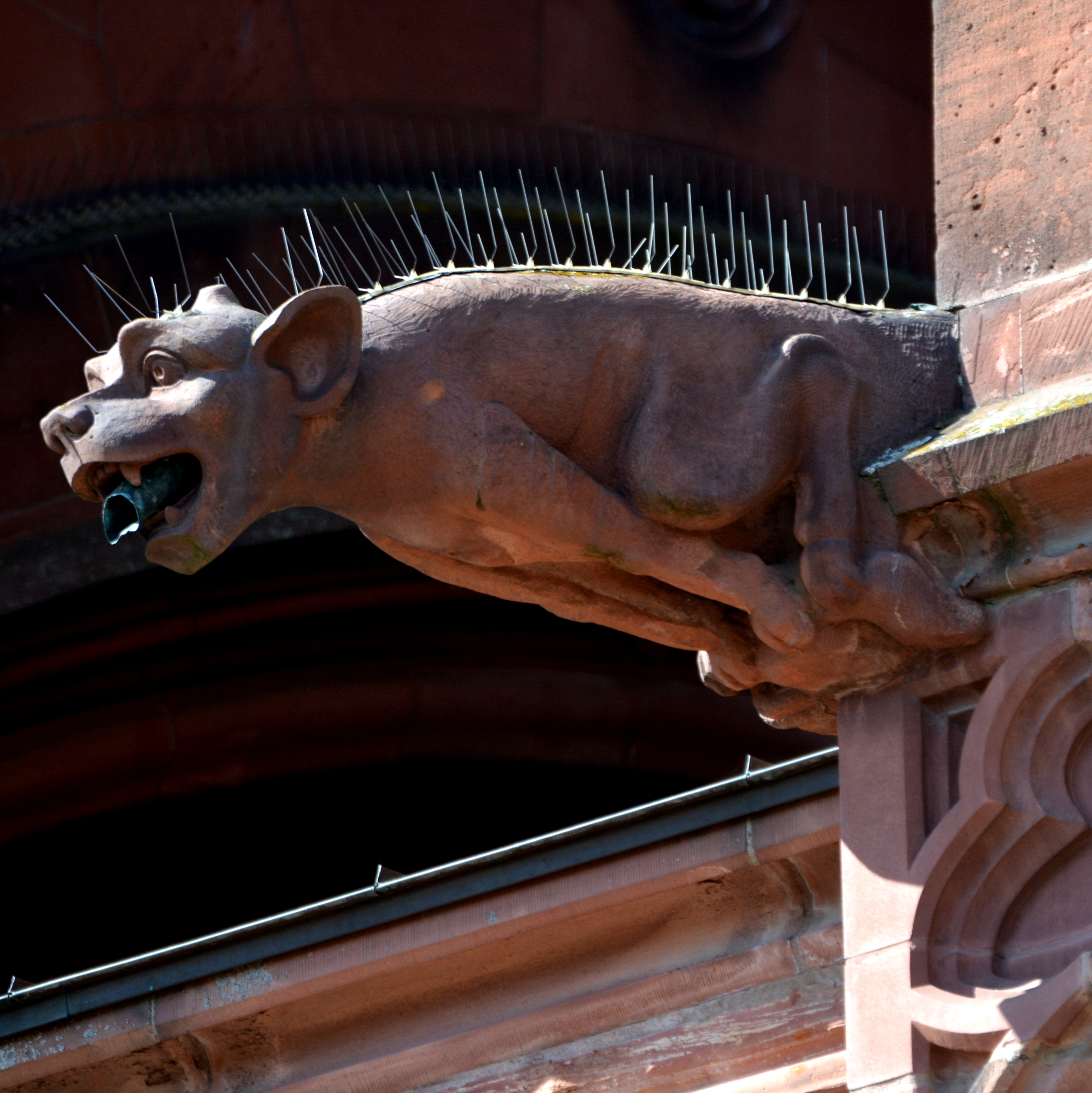 Katarinatsjerke, Oppenheim, wetterspijer